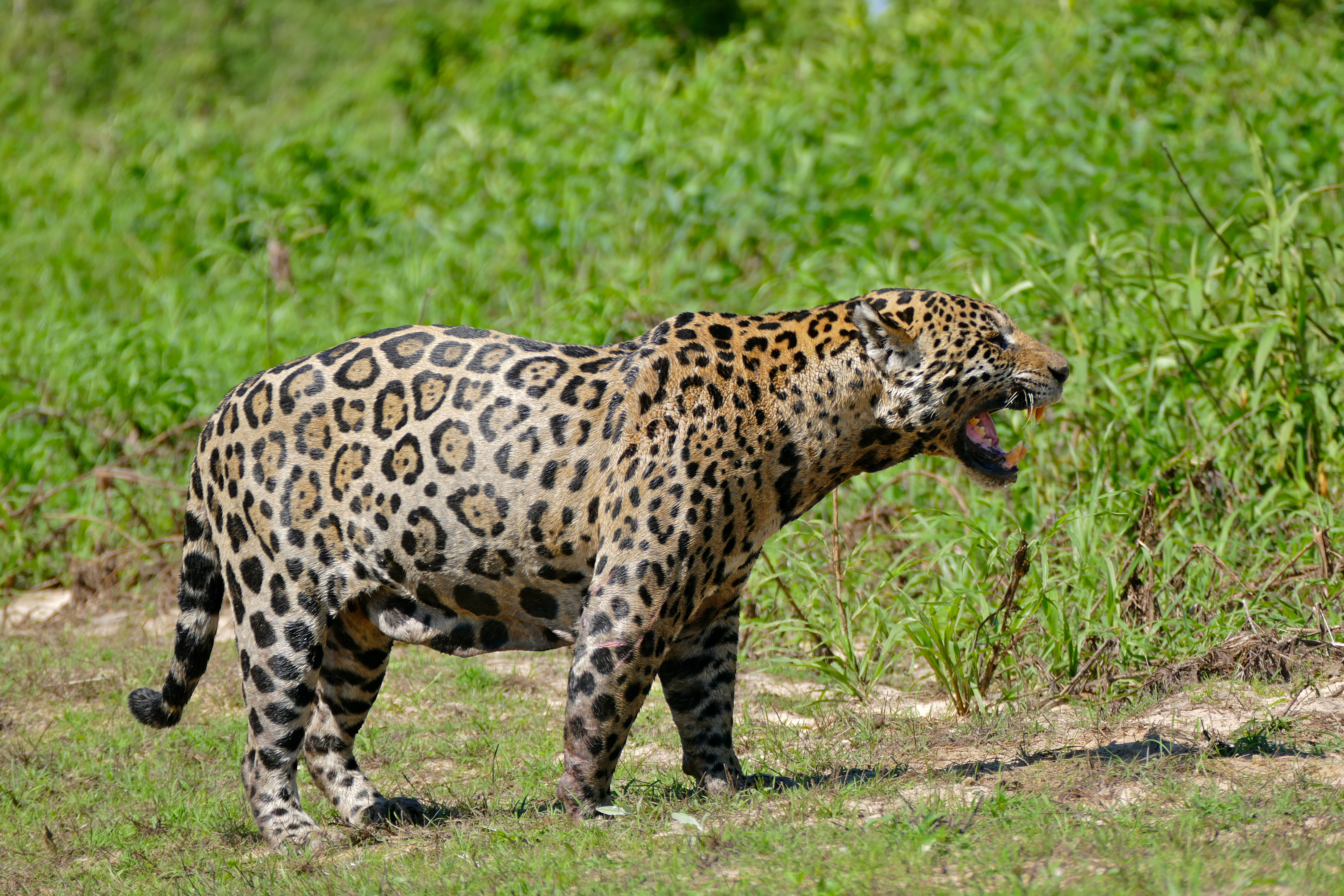 Rio São Lourenço, Porto Jofre, Pantanal, Poconé, Mato Grosso, BRAZIL